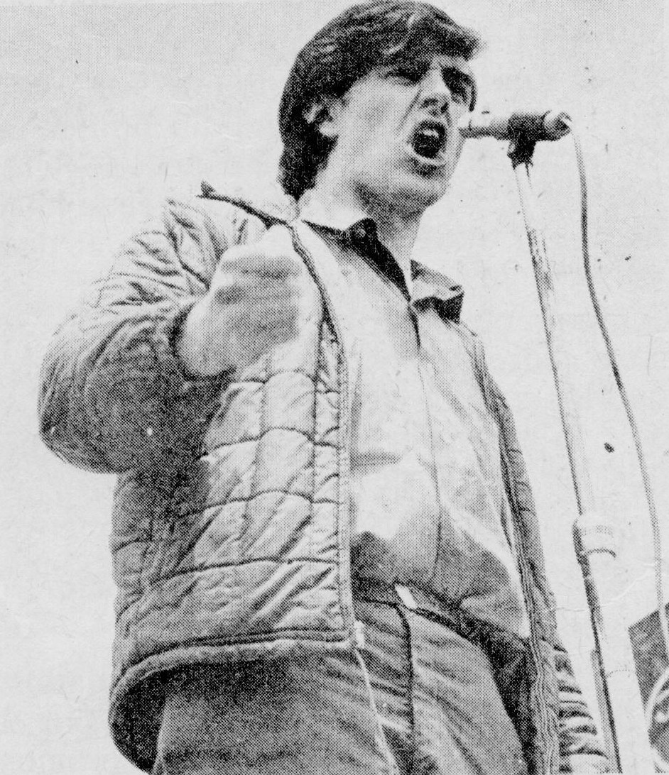 Marcel·lí Perelló speaking at a meeting